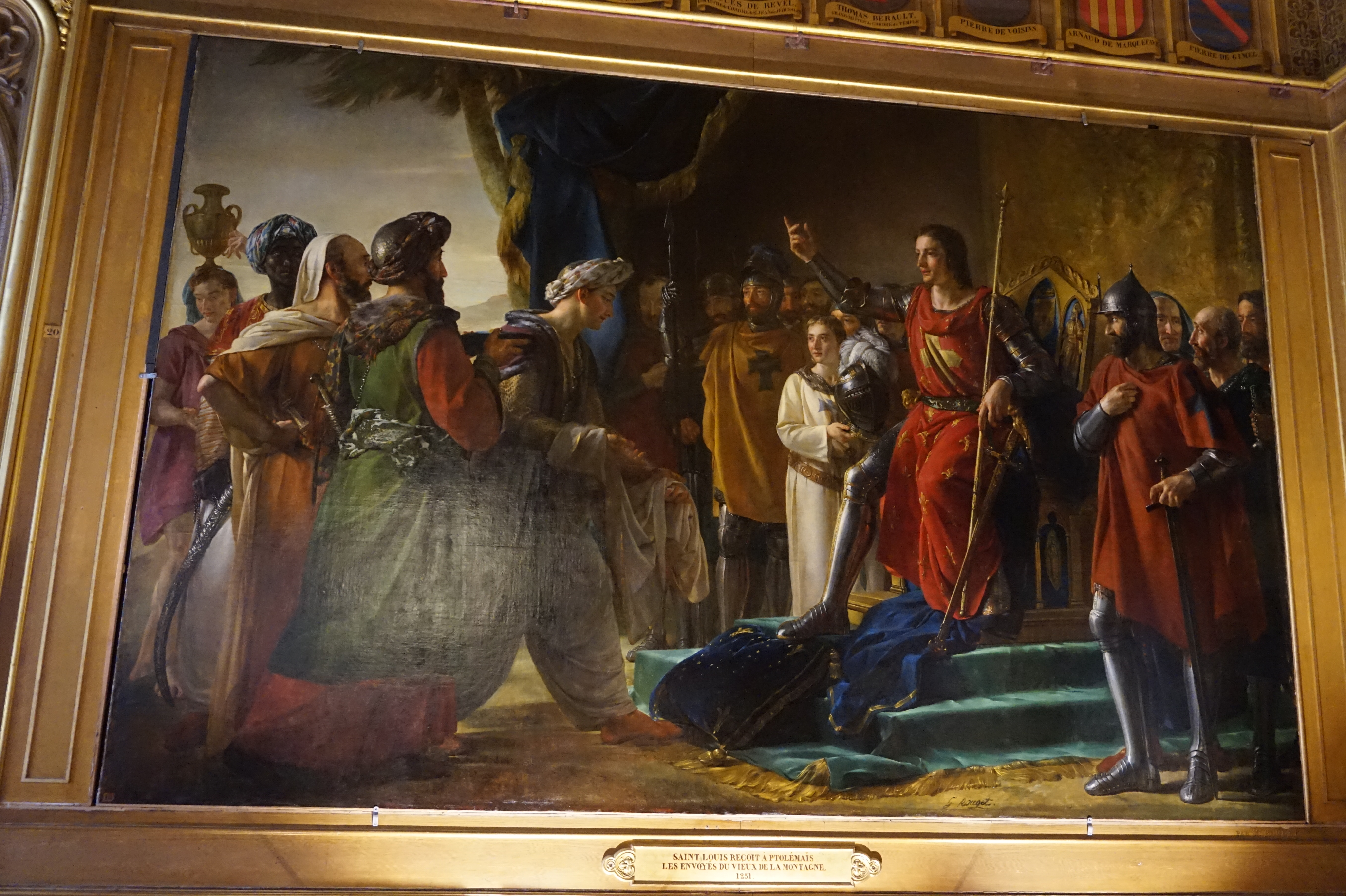 1251 Saint Louis reçoit à Ptolémaïs les envoyés du Vieux de la Montagne. Salles des Croisades, château de Versailles.